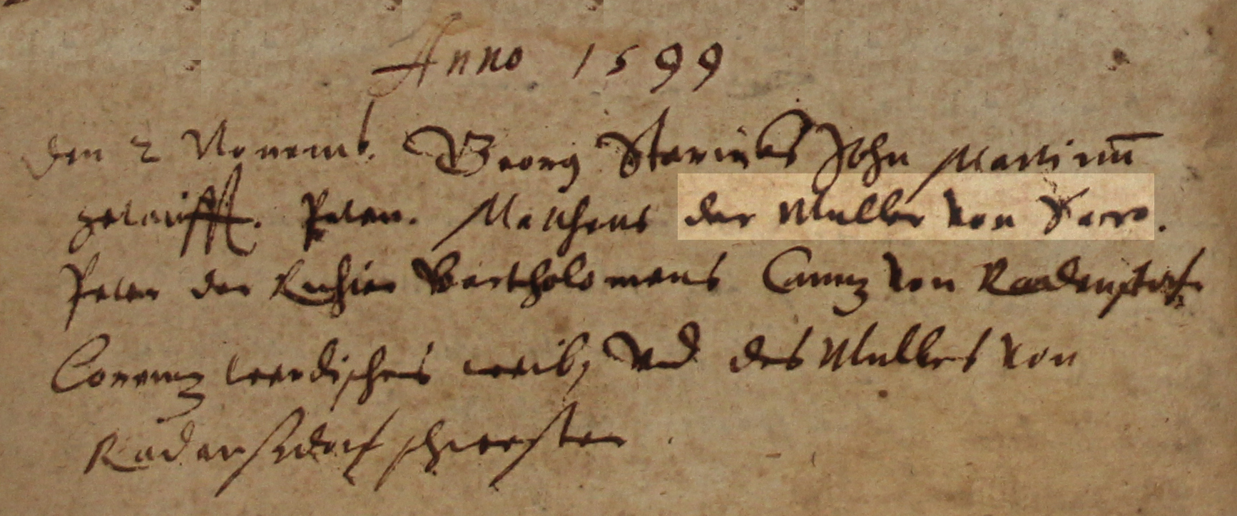 Schrackauer Mühle